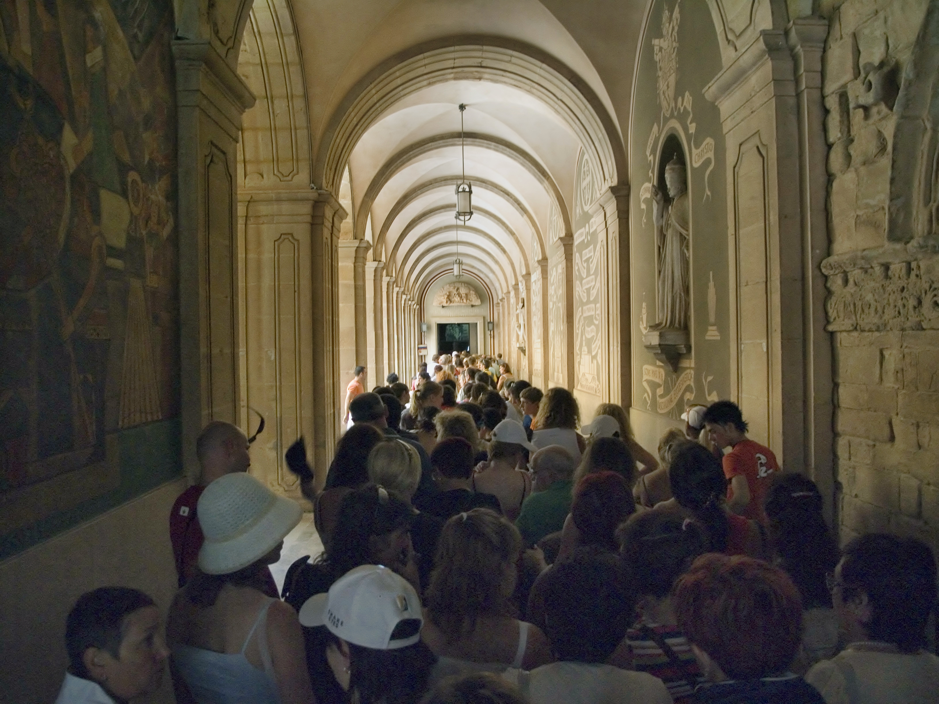 Каталония, монастырь Монсеррат - очередь в заалтарную часовню